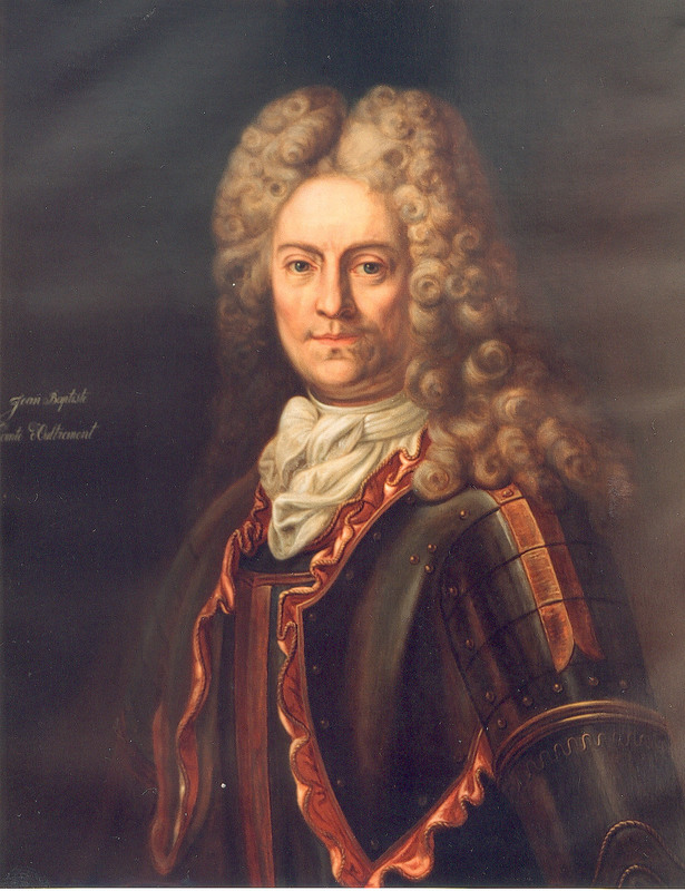 Comte Jean-Baptiste François d'Oultremont